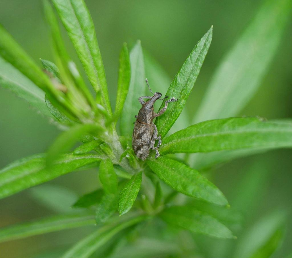 Lixus acutipennis：ハスジカツオゾウムシ 2018/07/06 和歌山県田辺市：Tanabe City. Wakayama Pref. Japan